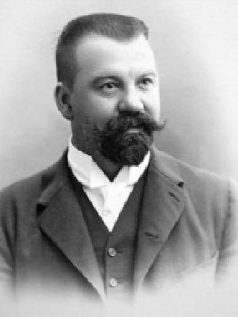 Jindřich Janotta (1856-1944), německý politik a podnikatel ve Slezsku, poslanec rakouské říšské rady a poslanec slezského zemského sněmu